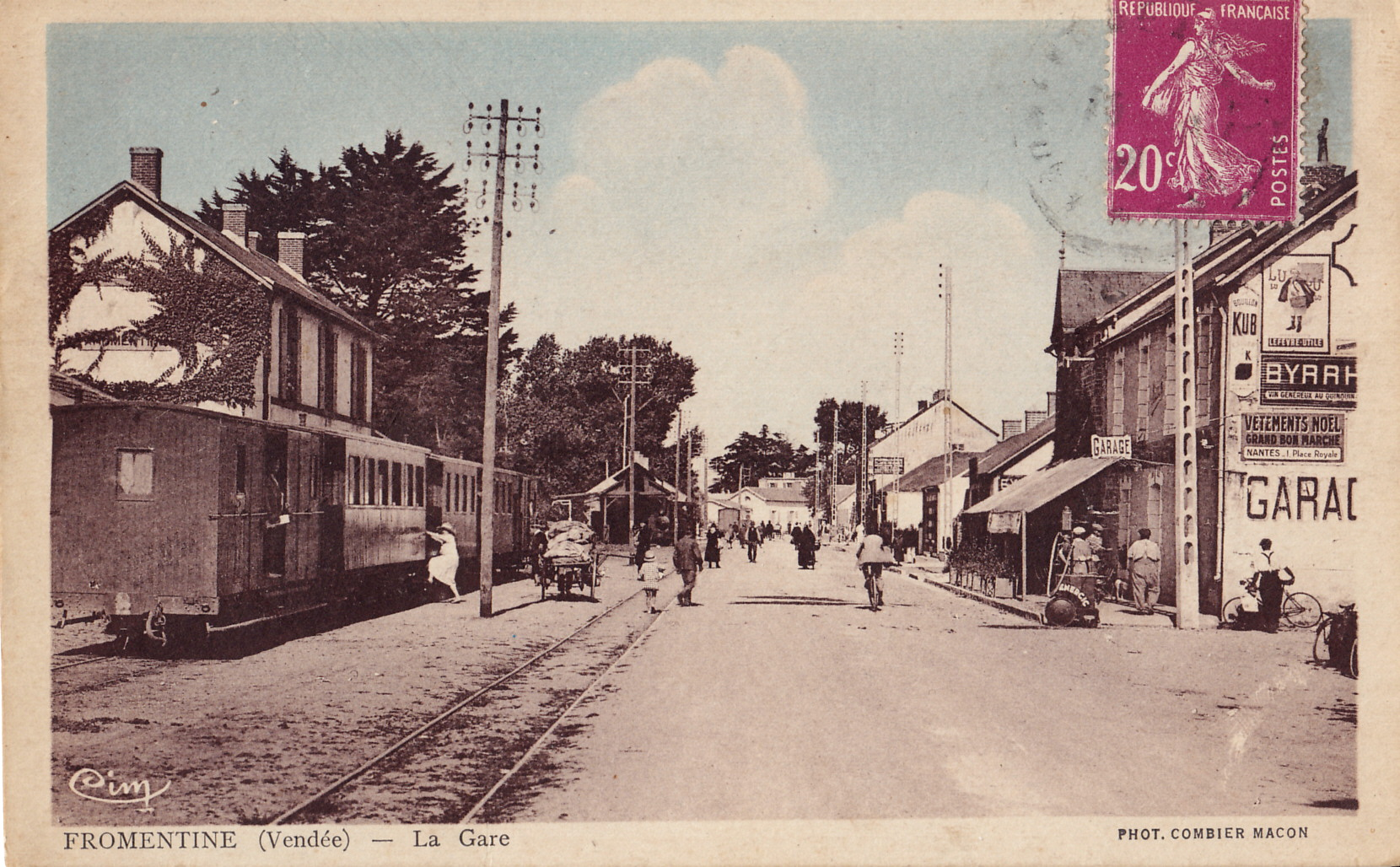 Carte postale ancienne éditée par CIM (Combier à Mâcon) :FROMENTINE - La Gare